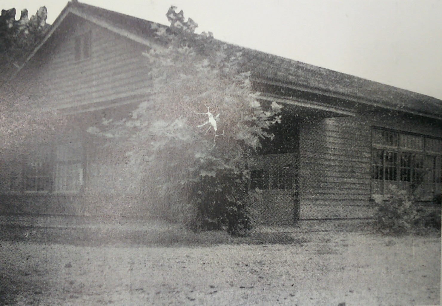 1950年頃の春日井市立図書館。